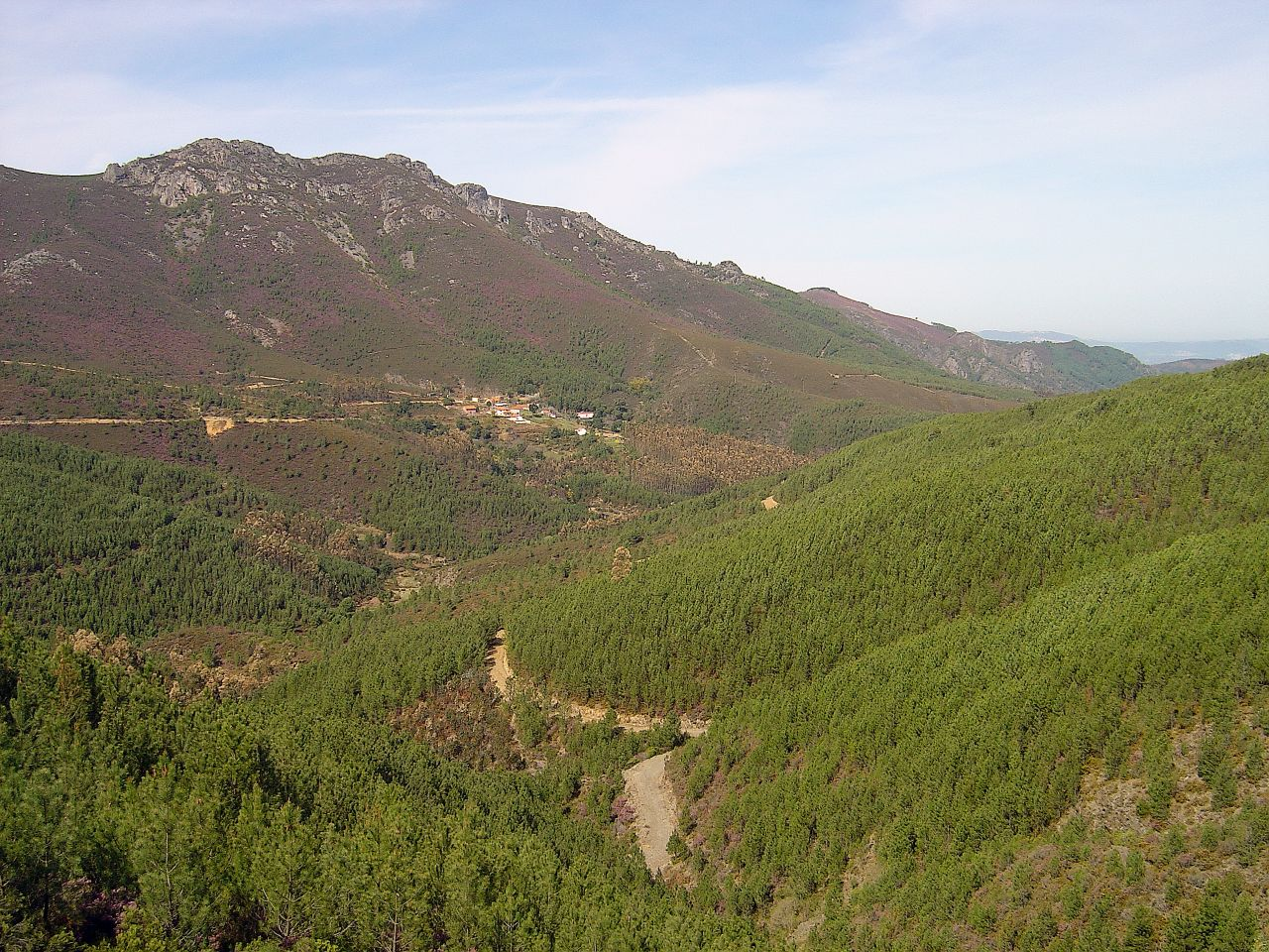 Serras da Pampilhosa da Serra - Portugal